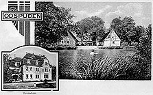 Historische Ansichtskarte von Cospuden. Das große Foto zeigt den Gasthof Oppermann, der im Volksmund wegen der geringen Höhe seiner Eingangstür auch "Café Bück dich" genannt wurde. Das kleine Foto zeigt die Hofseite des Cospudener Herrenhauses.